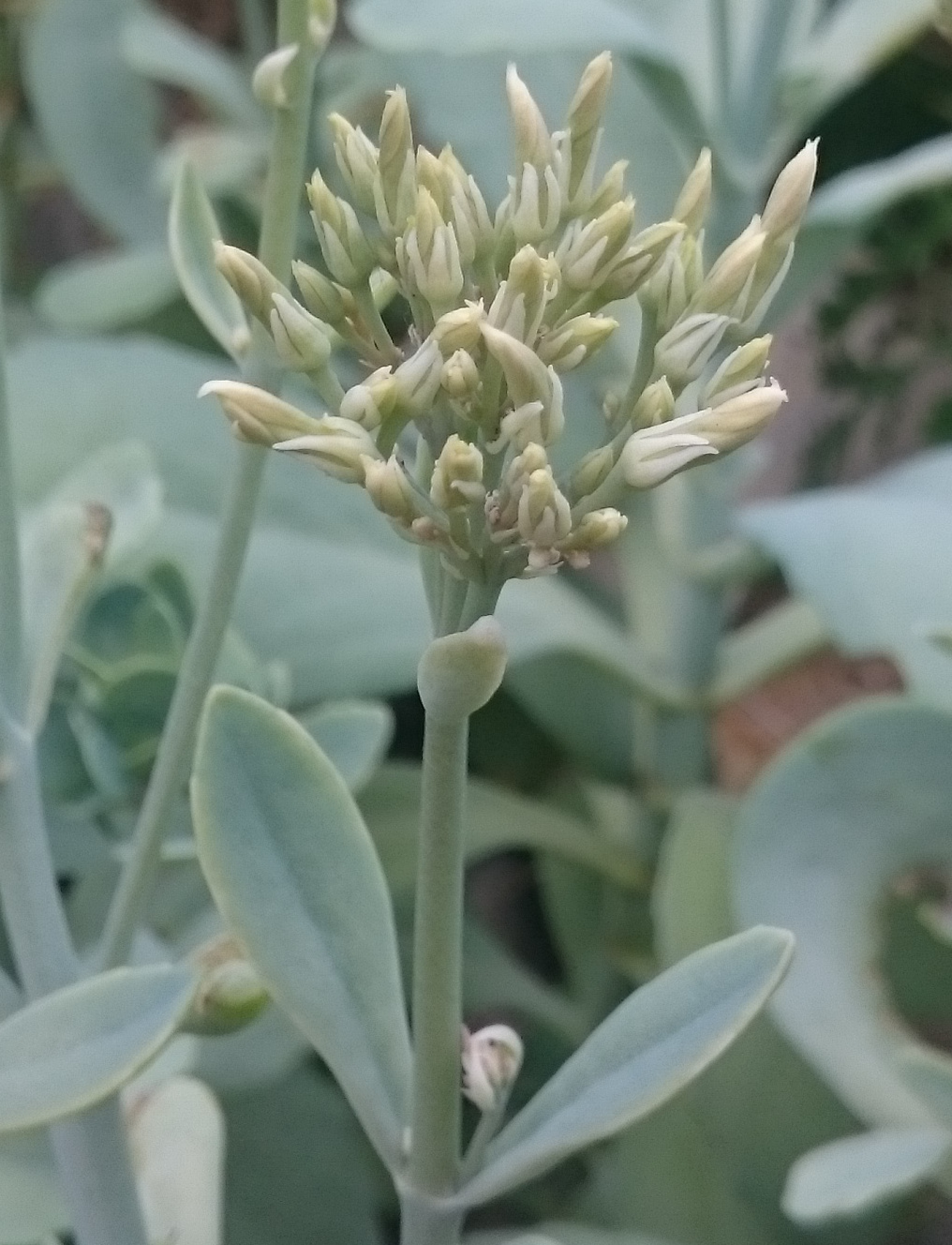 Kalanchoe prittwitzii im Botanischen Garten Hamburg